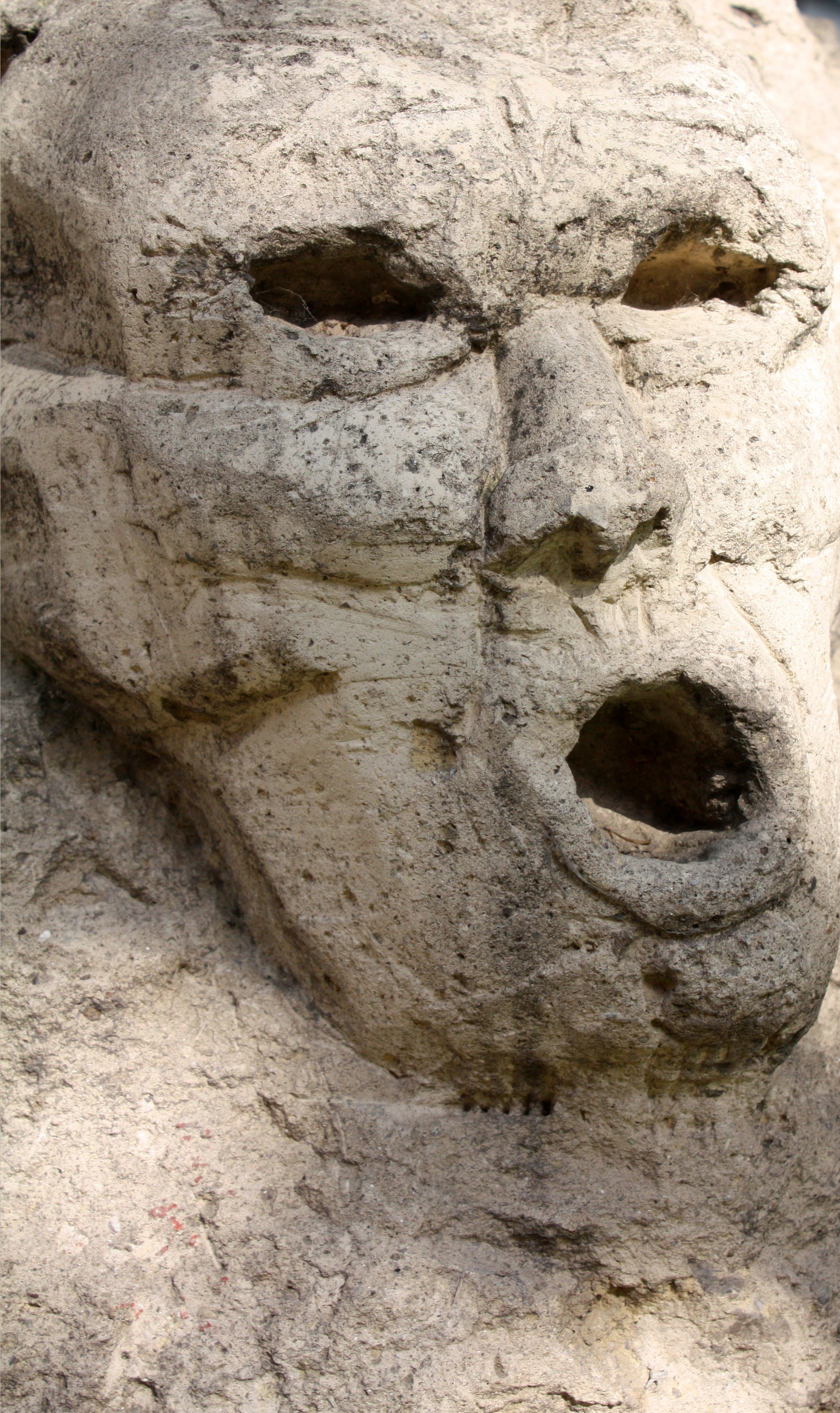 Skulptur „Der Stein des Anstoßes“. Denk–Mal von drinnen nach draußen, Bildhauerprojekt des Maßstab e. V. (Sommer 2000 im Kölner Gefängnis, Olaf B.). Plastik an der Zeughausstraße in der Kölner Innenstadt